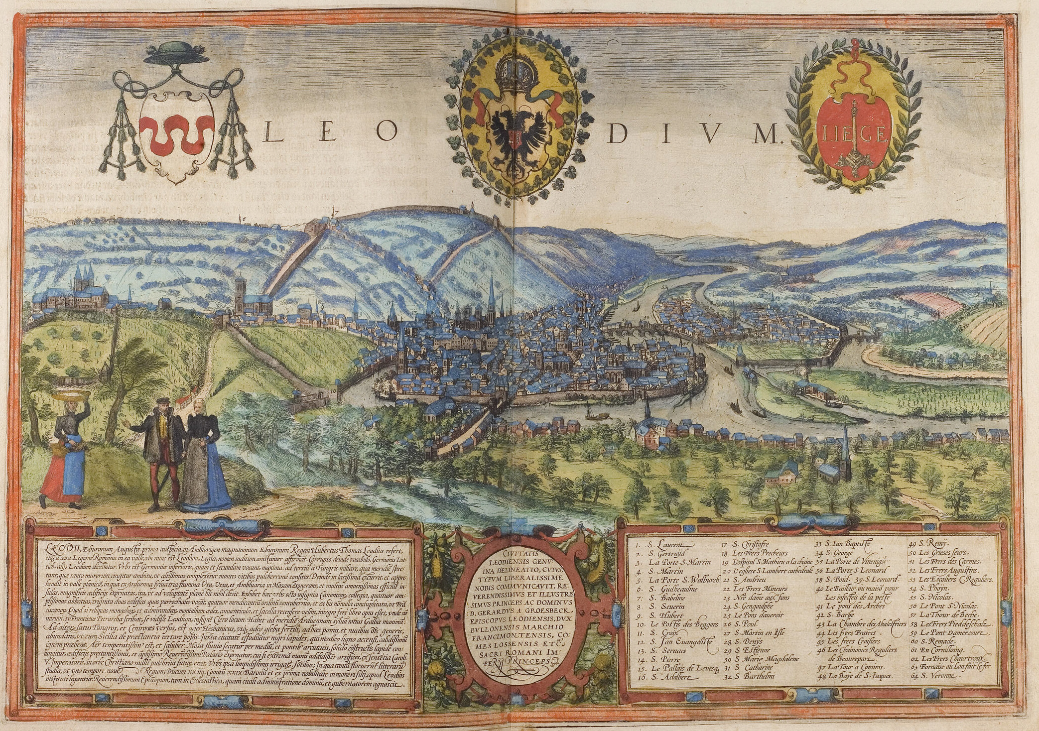 Liège